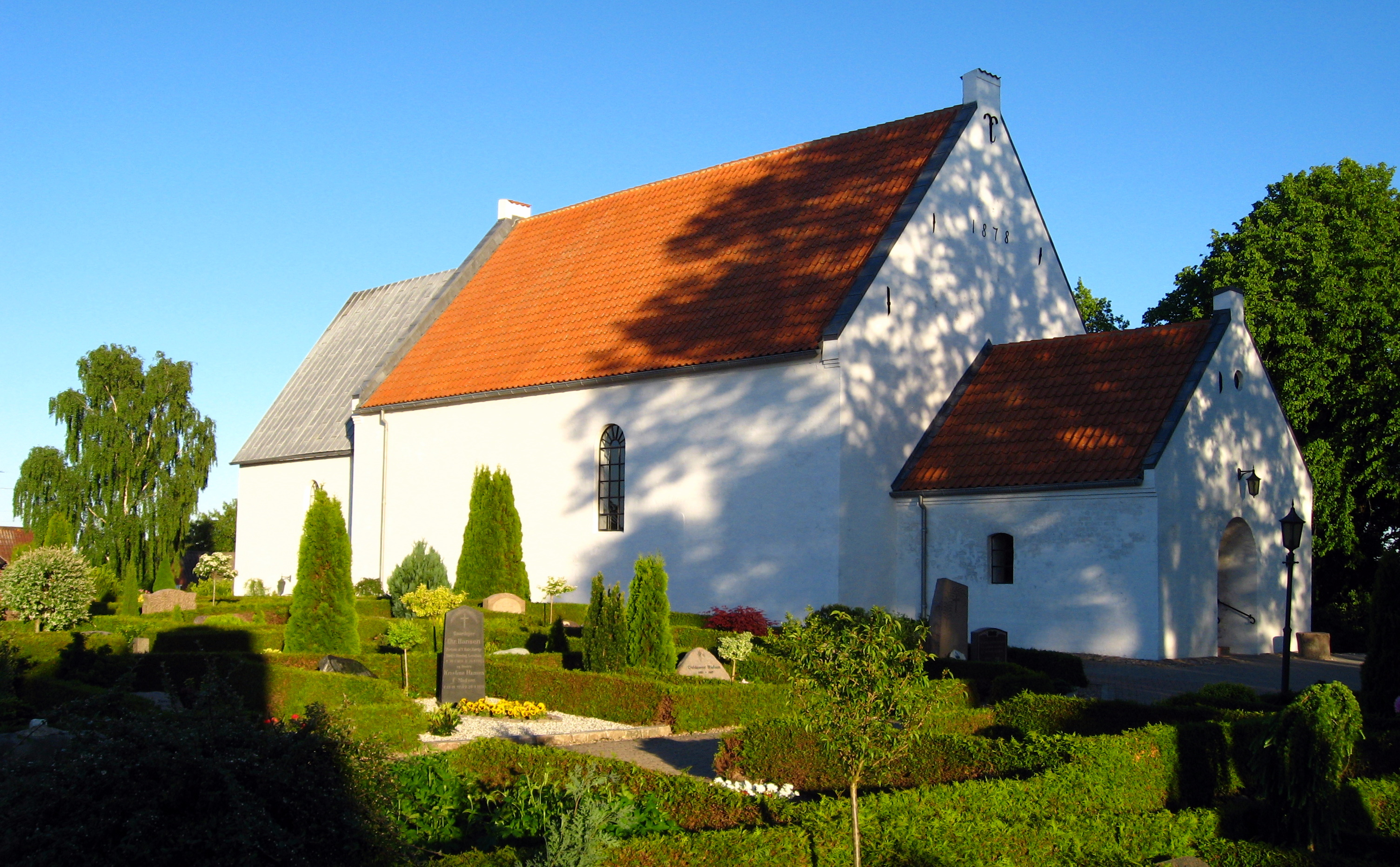 Lendum Kirke, Hjørring Kommune